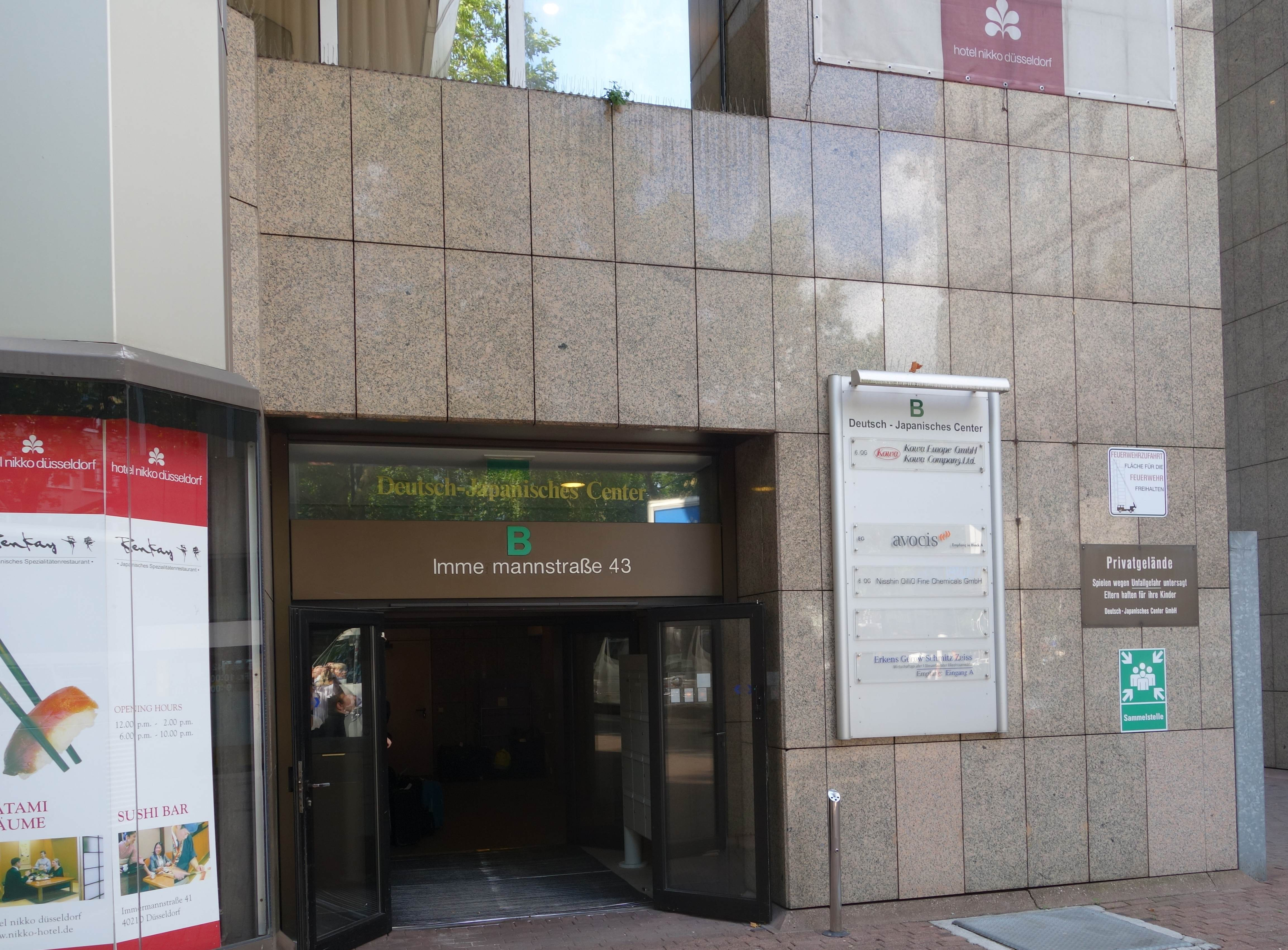 Düsseldorf, Deutsch-Japanisches Center, Immermannstraße 45, Eingang Immermannstraße 43.